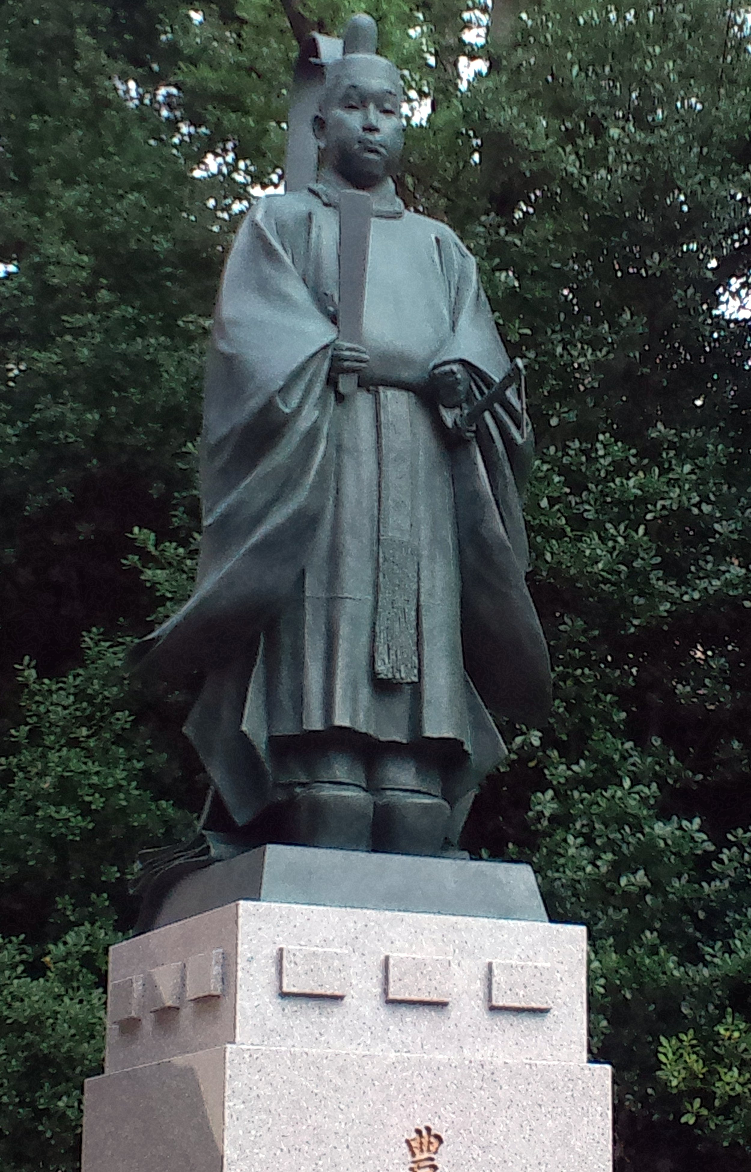 豊臣秀頼の像（玉造稲荷神社）